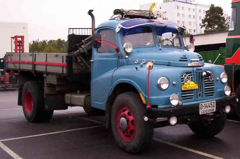 Austin LWB Truck 1954